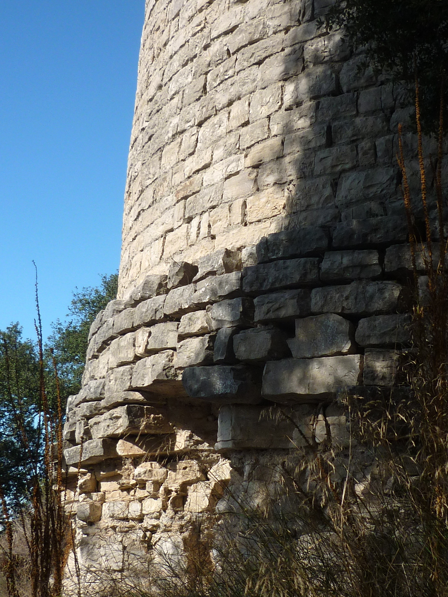 Torre de Gàver (Estaràs): detall del sòcol